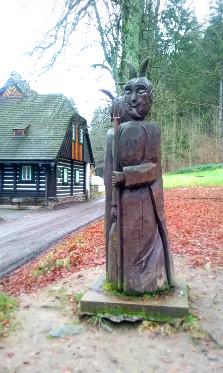 Čert u dětského hřiště u Bartoňovy útulny